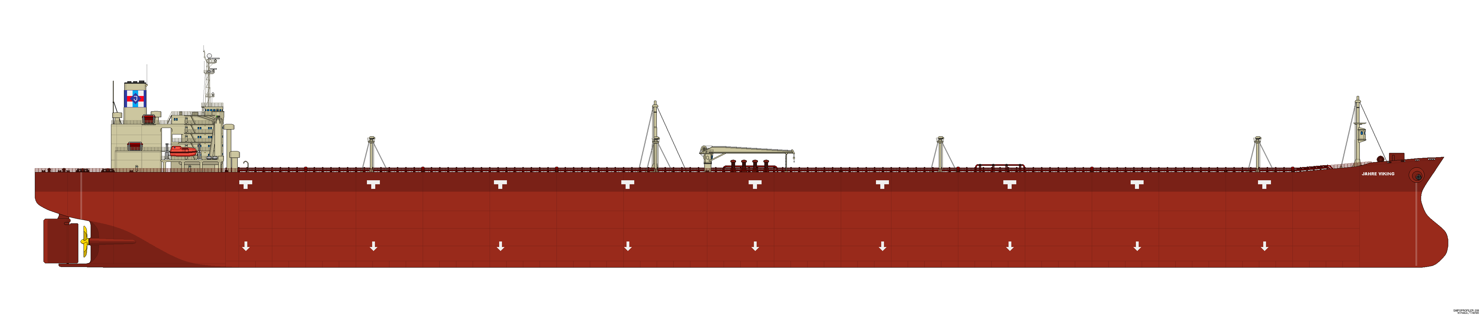 MT Jahre Viking 1979